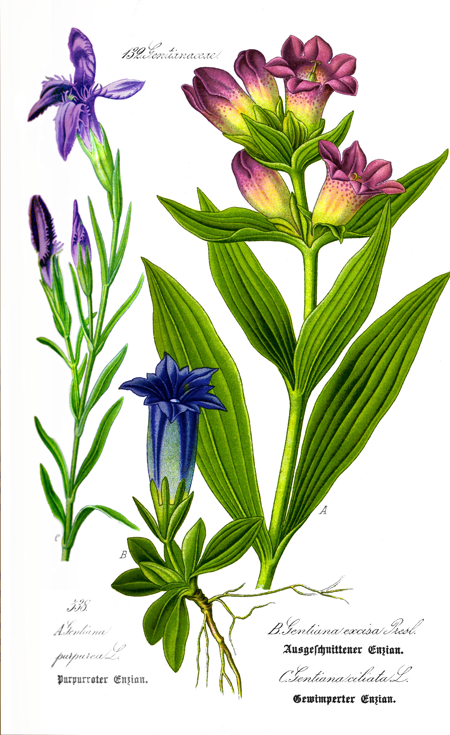 From Flora von Deutschland, Österreich und der Schweiz Genitiana purpurea L., Gentiana acaulis L., Gentianopsis ciliata (L.) Borkh.